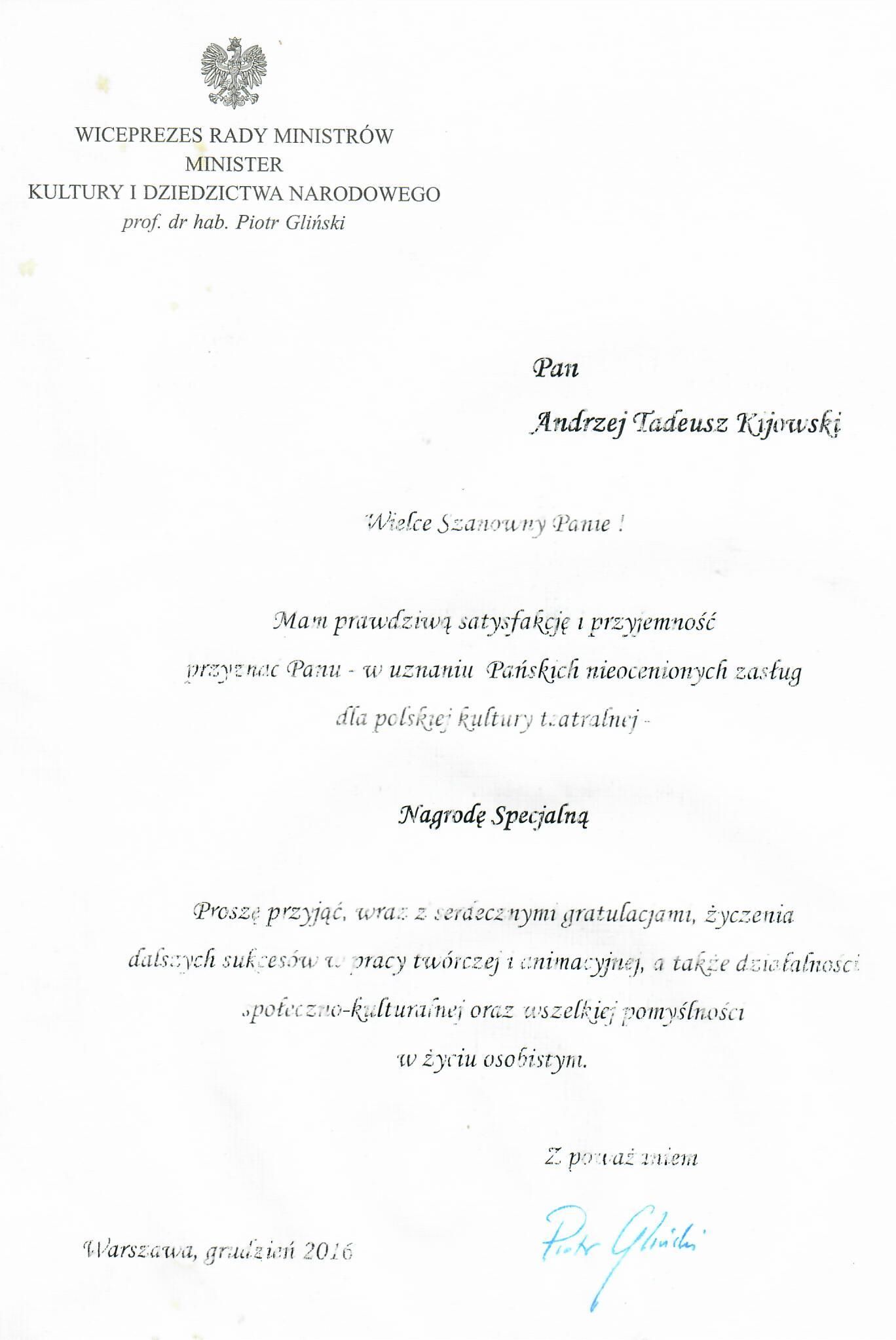 Nagroda specjalna Ministra Kultury 2016 dla Andrzeja Tadeusza Kijowskiego za "nieocenioe zasługi dla polskiej kultury teatralnej".